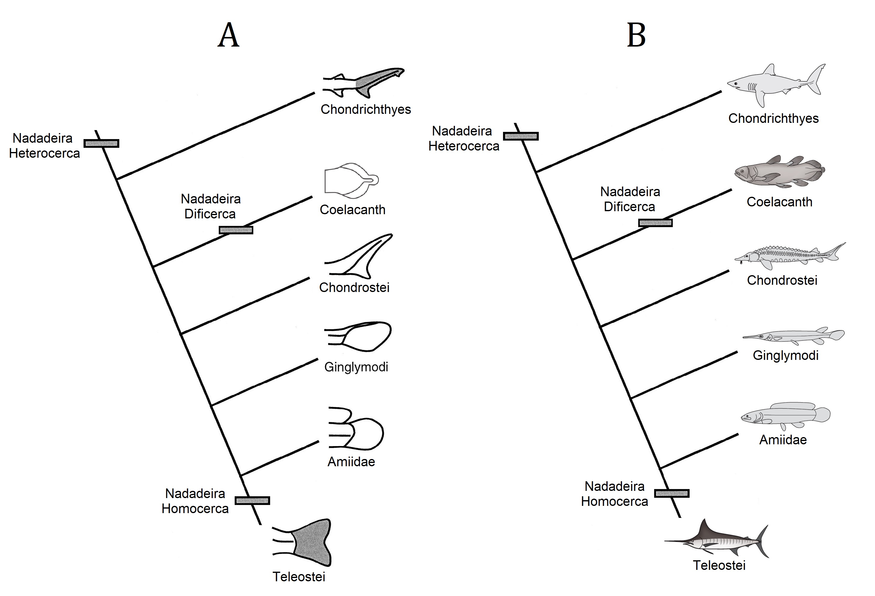 A. Cladograma de evolução da nadadeira caudal com nadadeiras esquematizadas. Modificado de "Function of the Caudal Fin During Locomotion in Fishes: Kinematics, Flow Visualization, and Evolutionary Patterns", George V. Lauder, Integrative and Comparative Biology, Volume 40, Issue 1, February 2000, Pages 101–122. B. Cladograma de evolução da nadadeira caudal com exemplos de organismos. Modificado de "The Diversity of Fishes. Biology, Evolution, and Ecology", Gene S. Helfman et al., Primeira Edição de 2009, editora John Wiley & Sons.